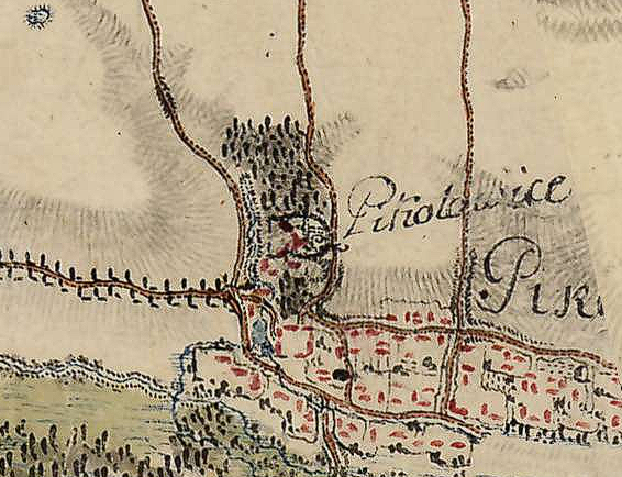 пікуловичі мапа фон міга 18ст